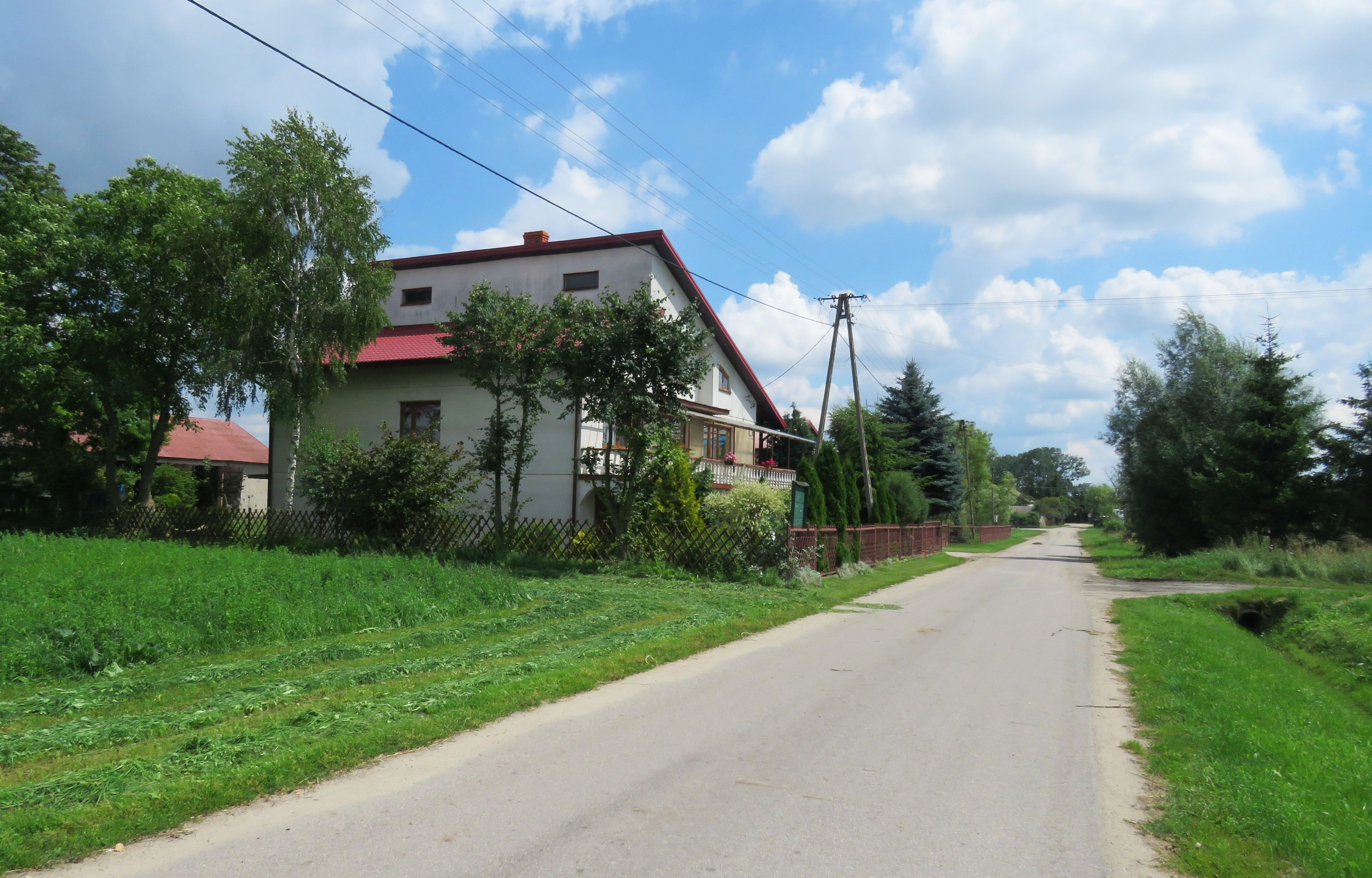 Kraszewo Falki